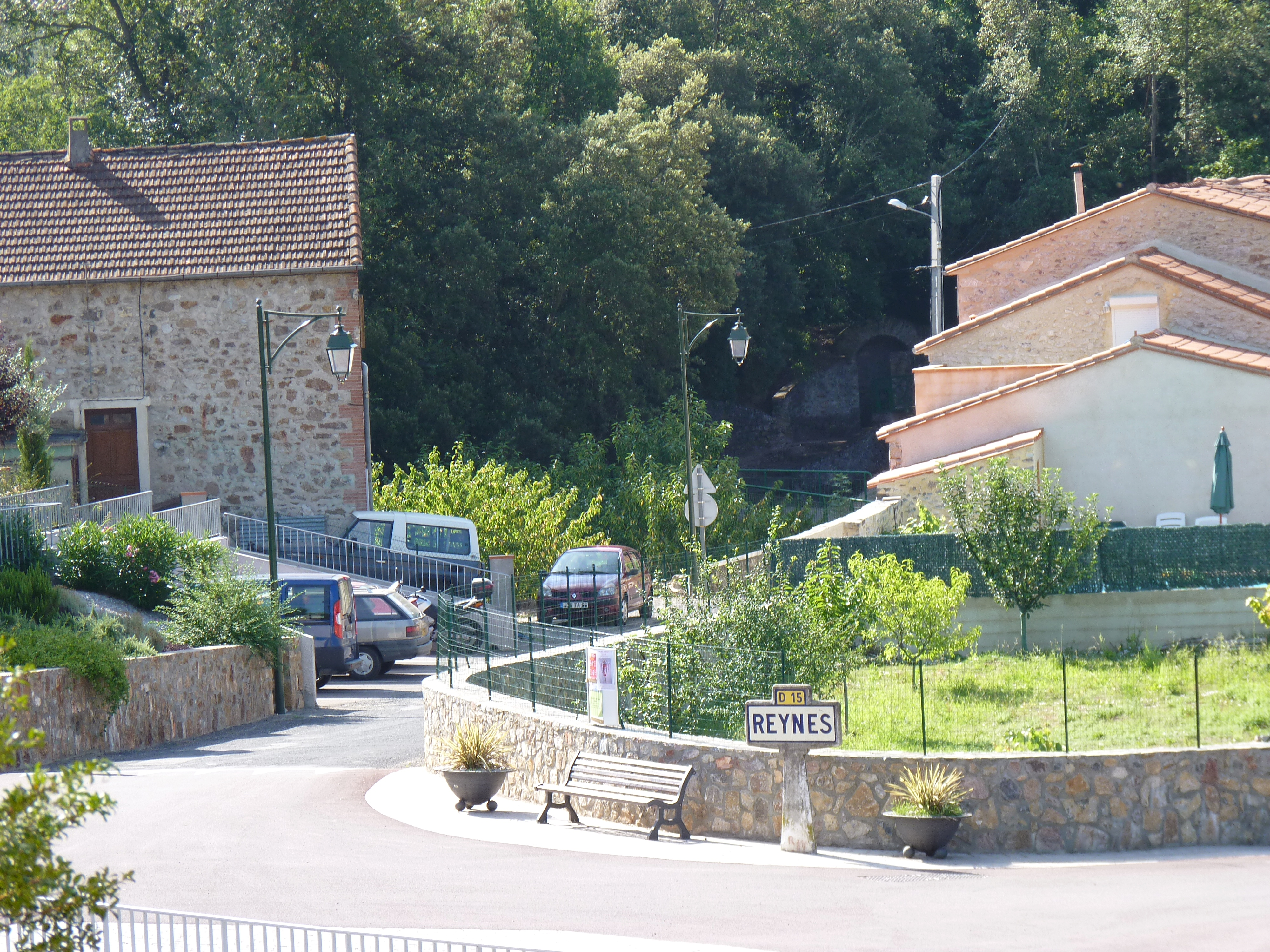 Reynès (Pyrénées-Orientales, Languedoc-Roussillon, France)